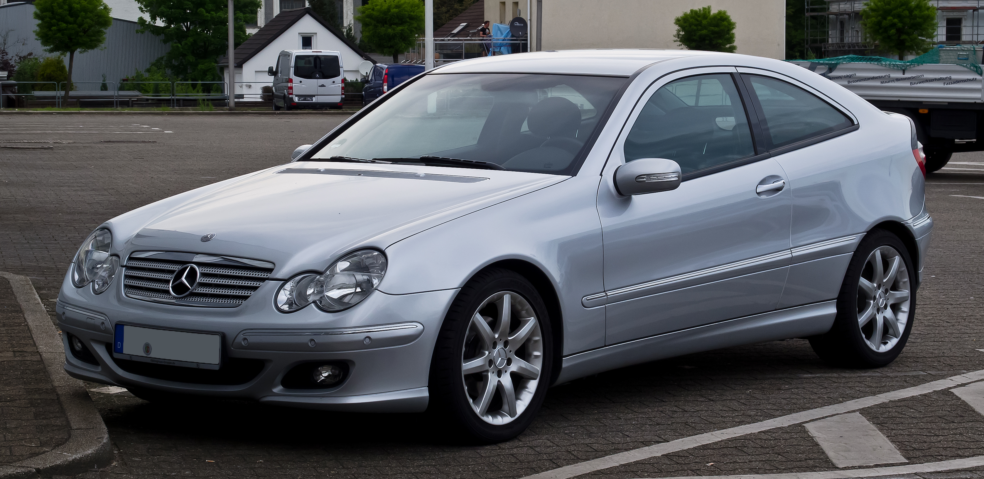 Mercedes-Benz C 180 Kompressor Sportcoupé (CL 203, Facelift)